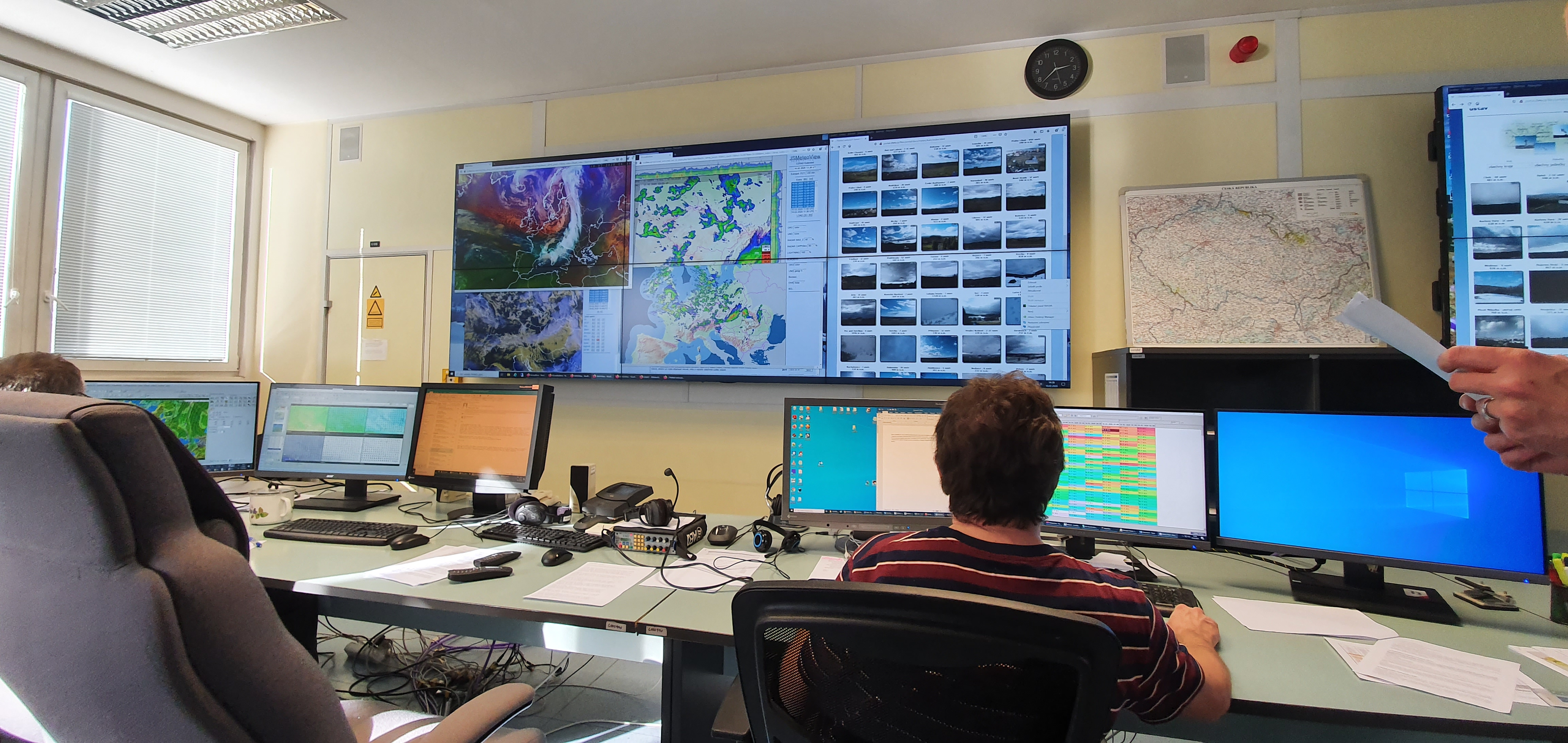 Centrální předpovědní pracoviště ČHMÚ